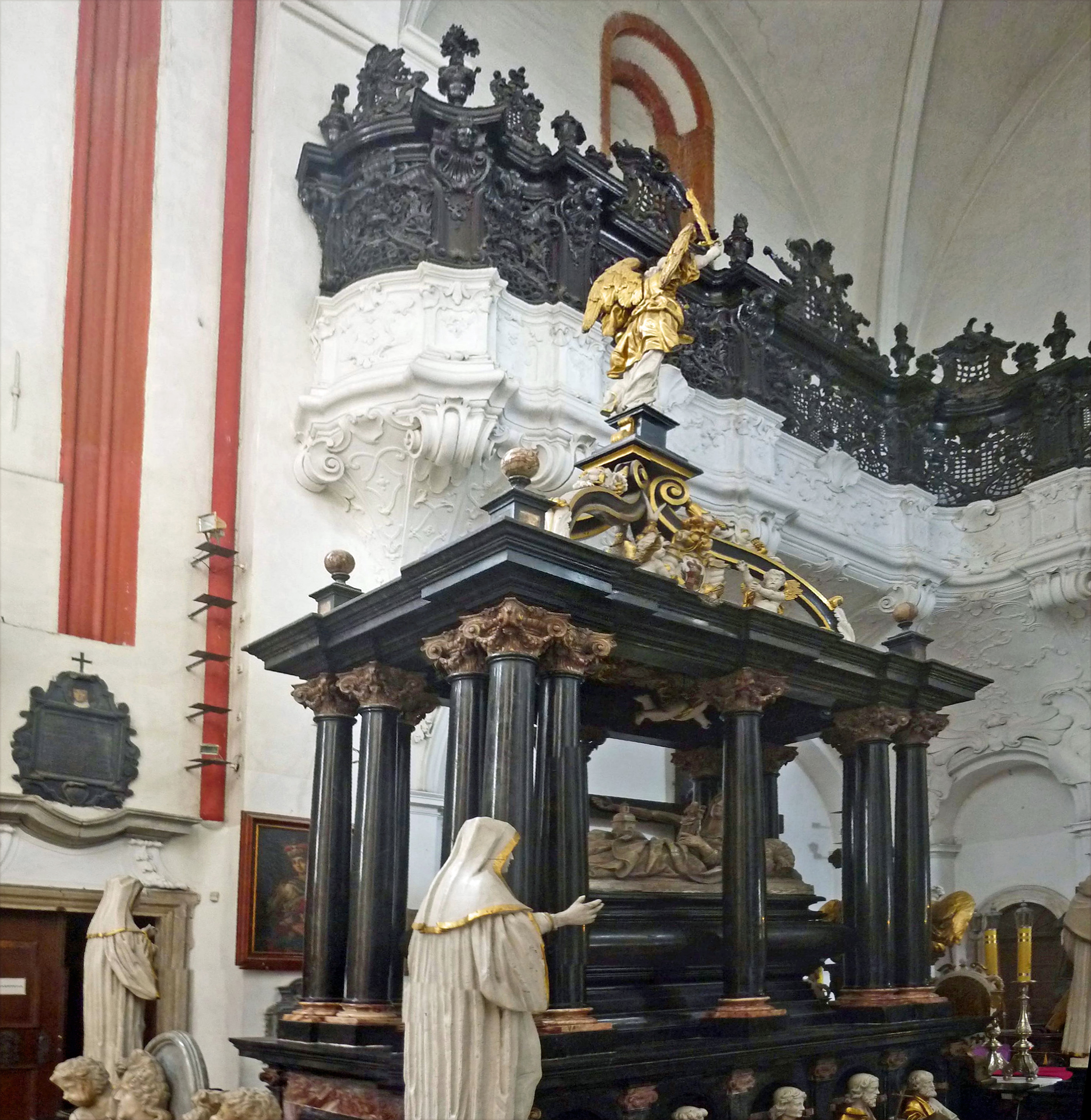 Grabmal der Hl. Hedwig von Schlesien (Święta Jadwiga Śląska) in der Klosterkirche von Trebnitz/Trzebnica